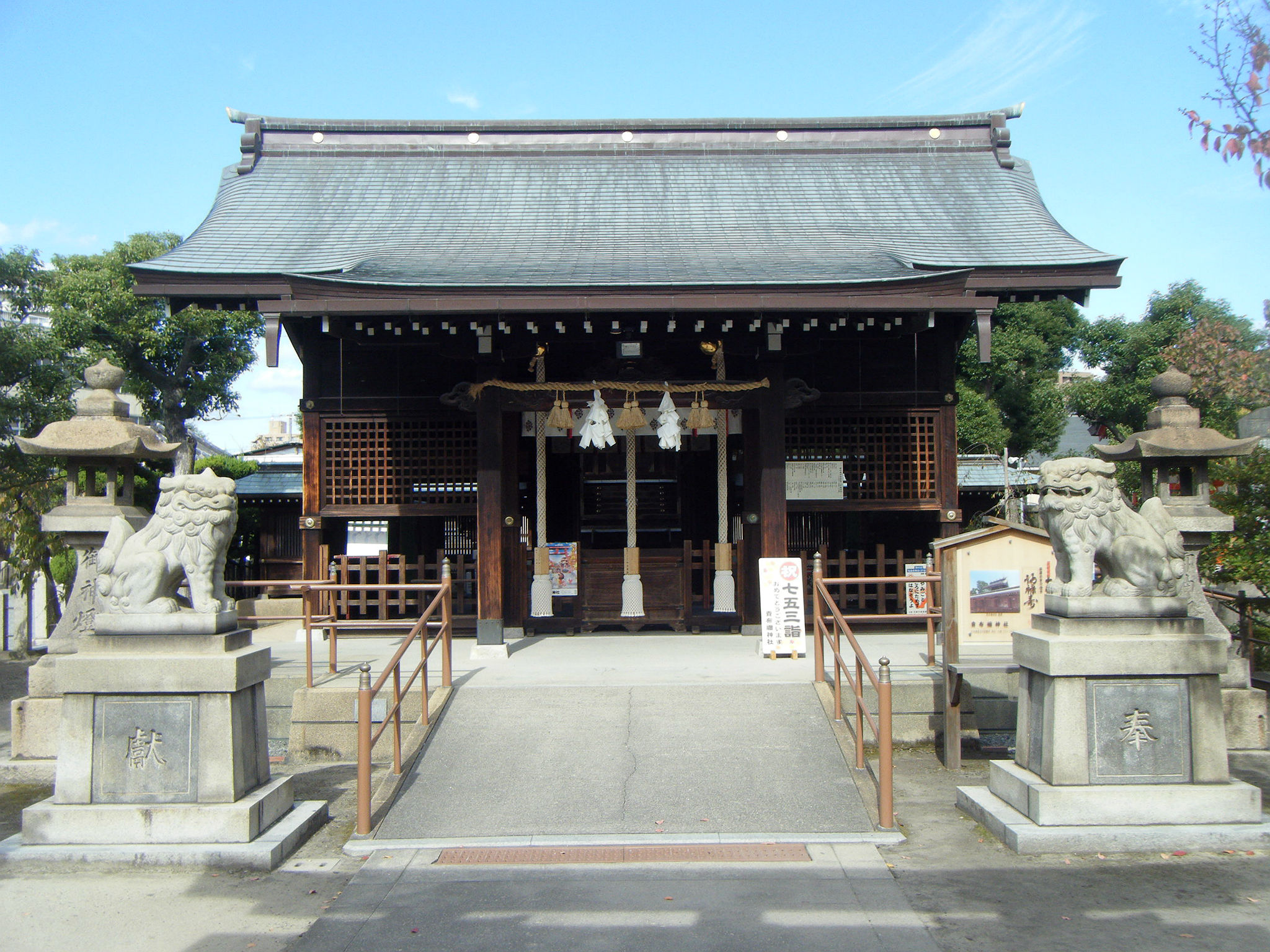 尼崎・貴布禰神社 社殿正面